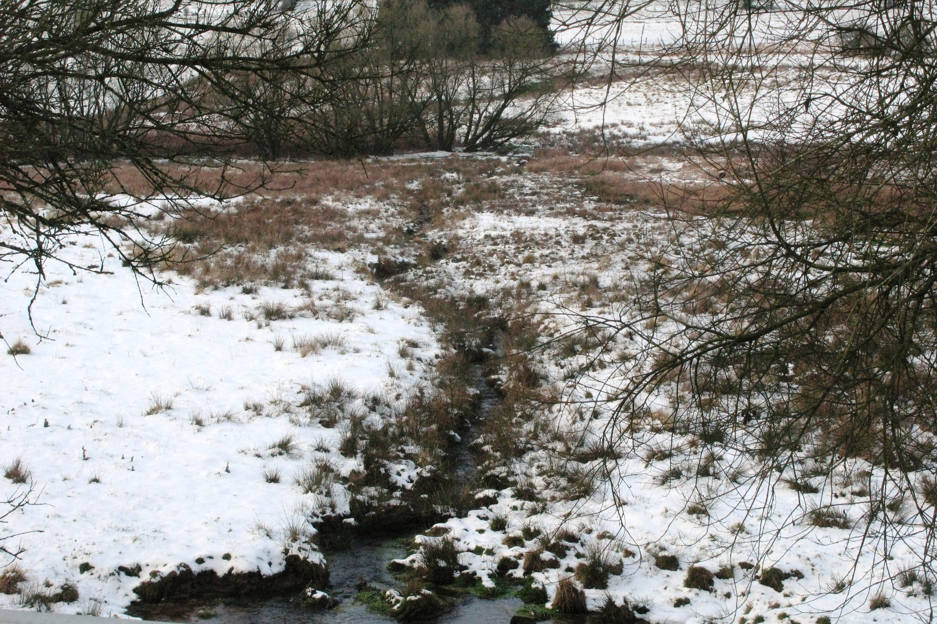 D'Brühl just virum Zesummfloss mat der Ourthe orientale, tëscht Deiffelt an Ourthe.